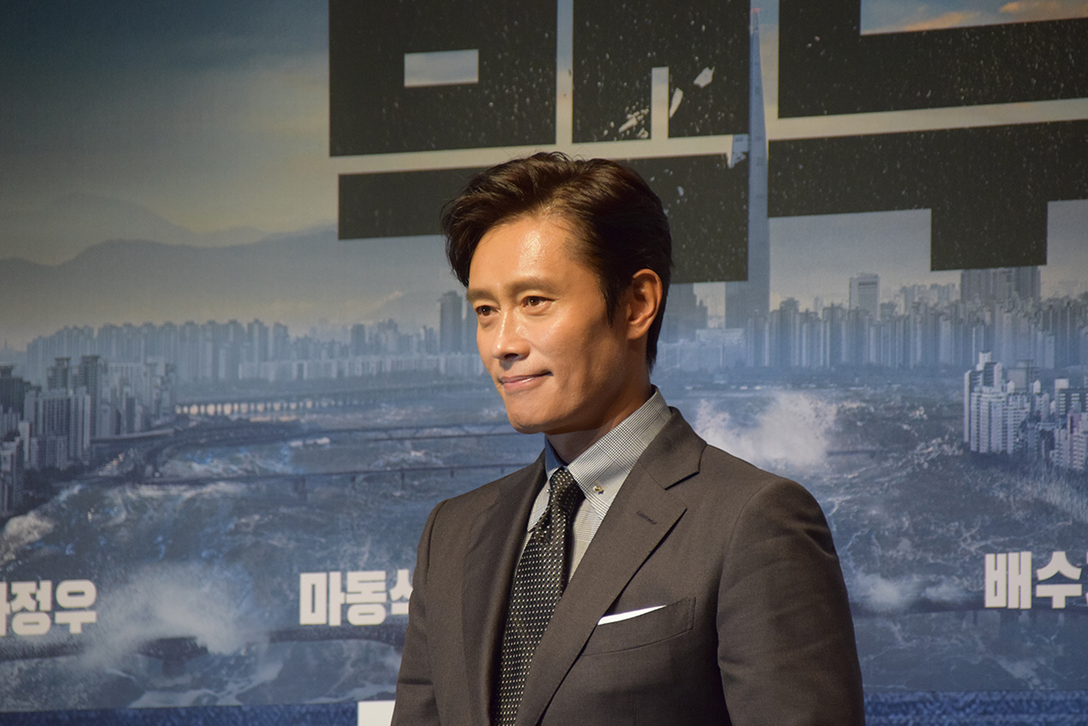 영화 '백두산' Mount Paektu 제작보고회 현장 (2019.11.19)